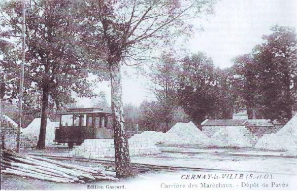 Cernay-la-Ville - Carriere des Maréchaux - Depot de Paves